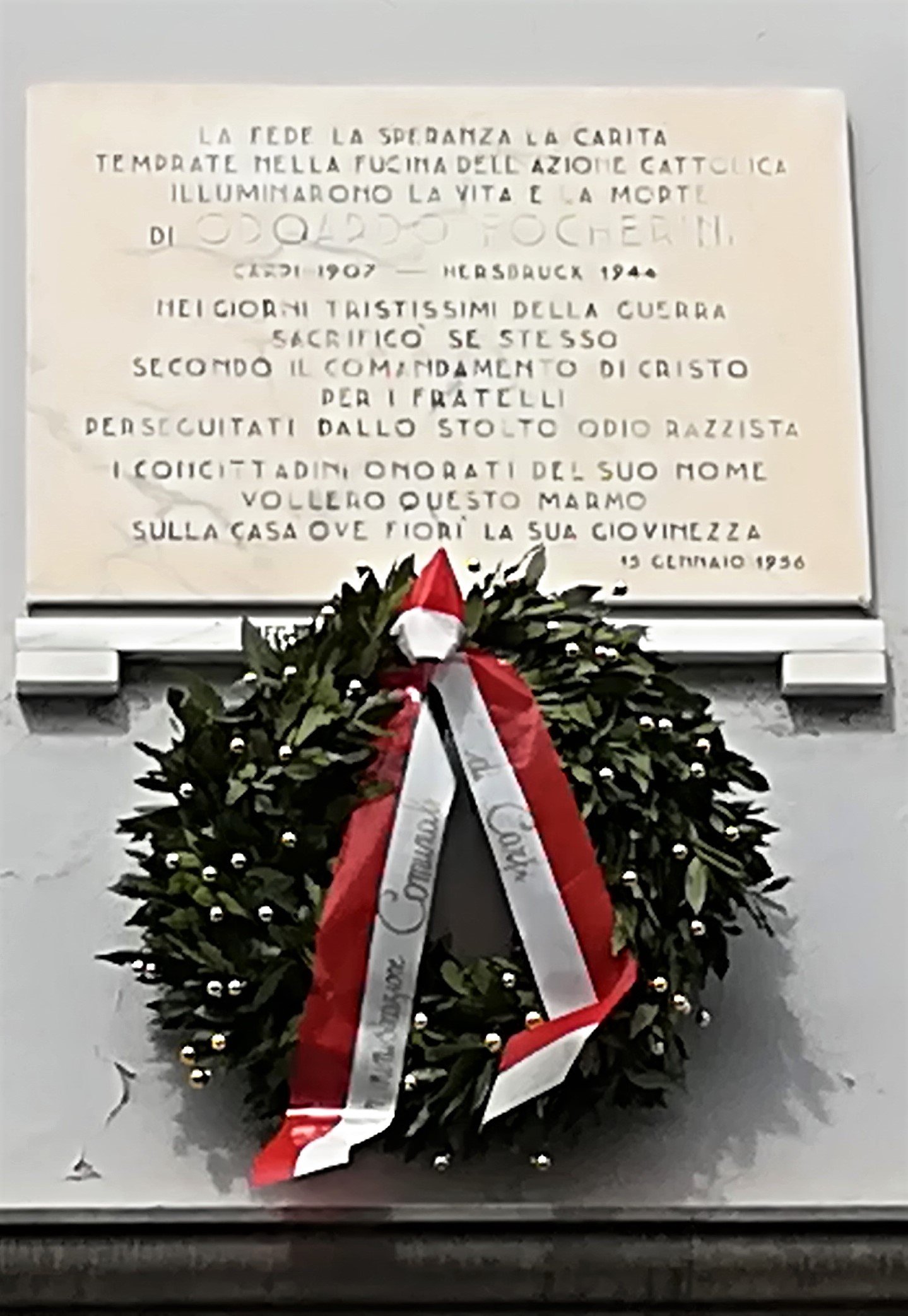 Carpi (Modena)